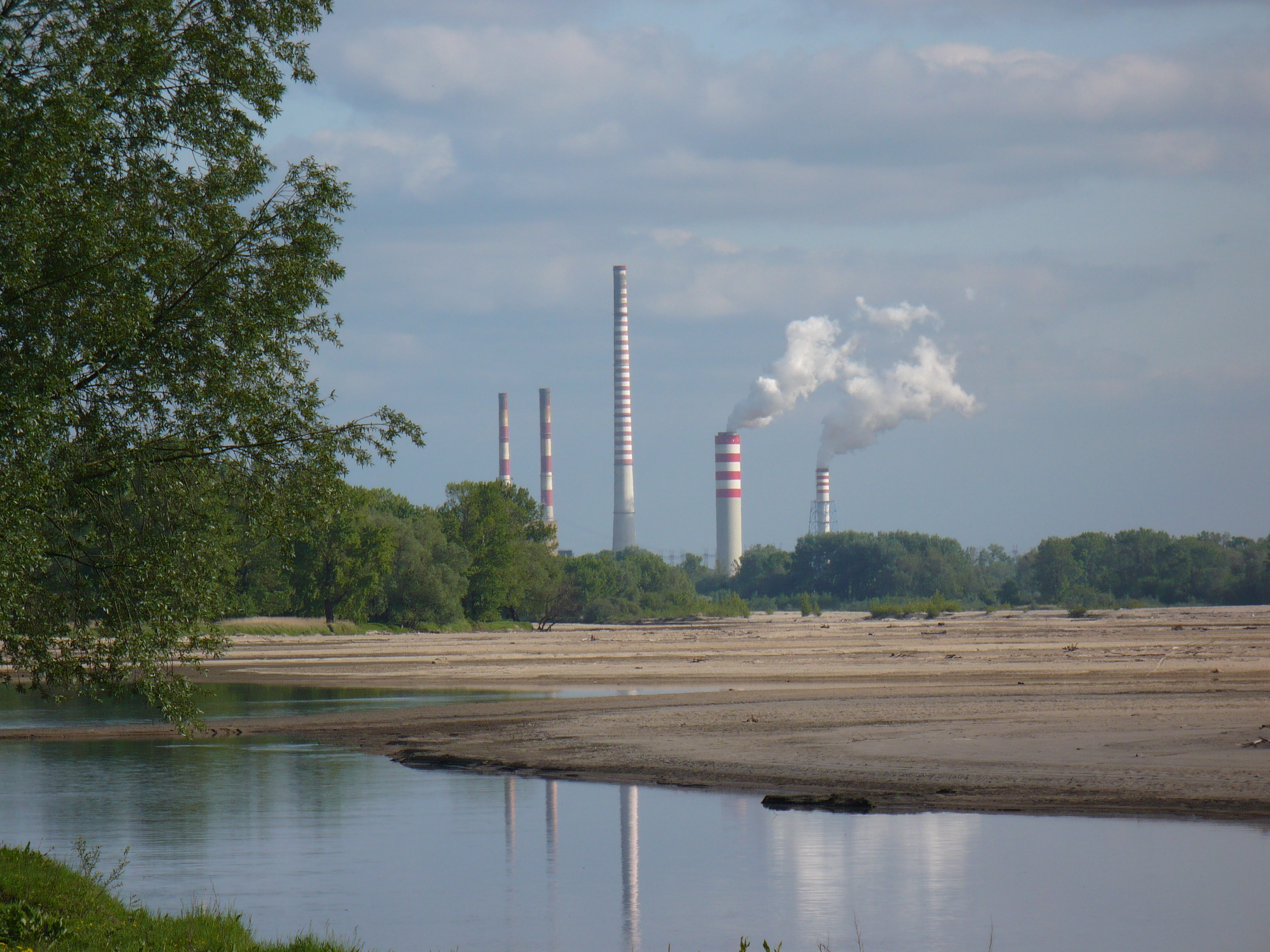 Kraski Nowe, wschodni brzeg, elektrownia kozienice